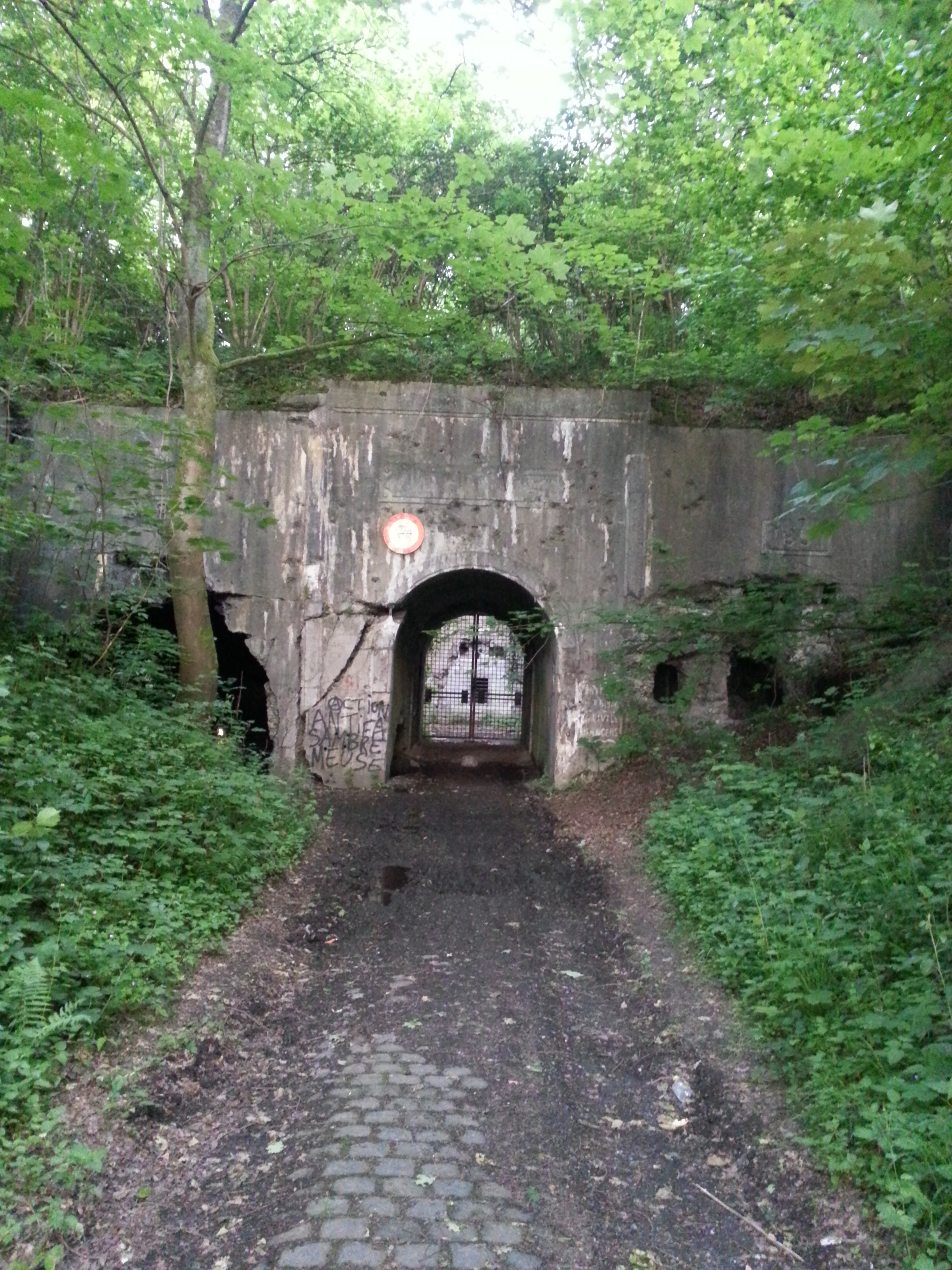 L'entrée principale du Fort de Dave